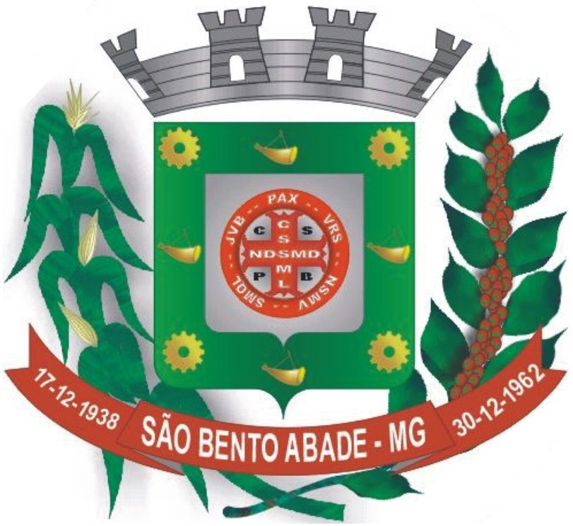 Brasão de Armas do município de São Bento Abade, Minas Gerais, Brasil.